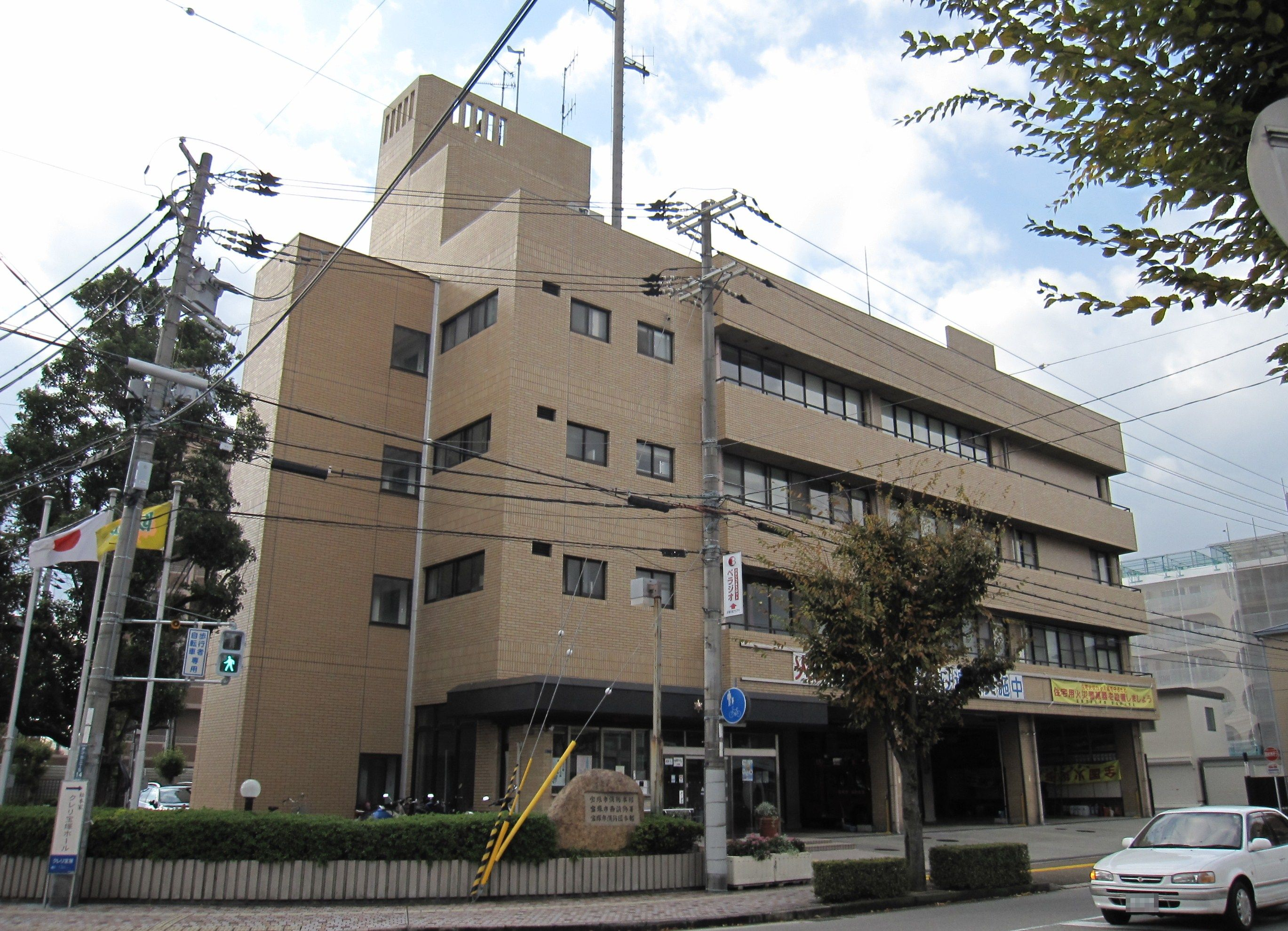 宝塚市消防本部庁舎